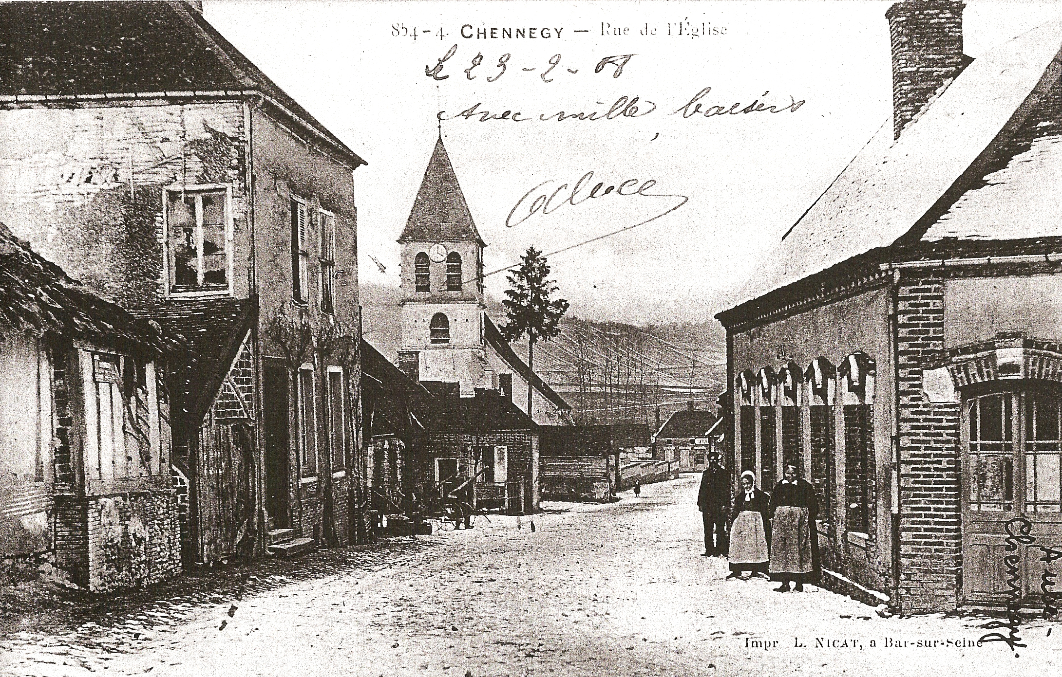 village chennegy